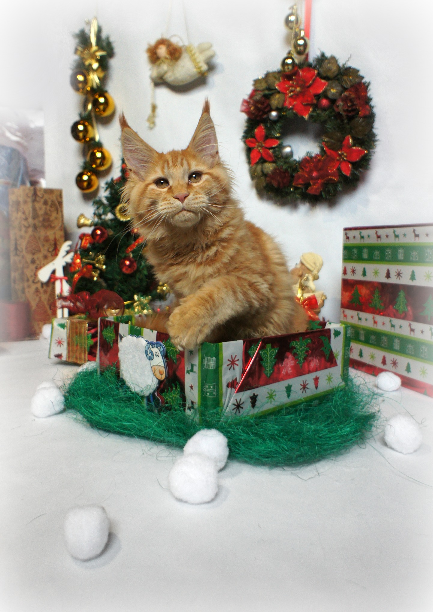 Котенок Мейн Кун питомник Liger Cat